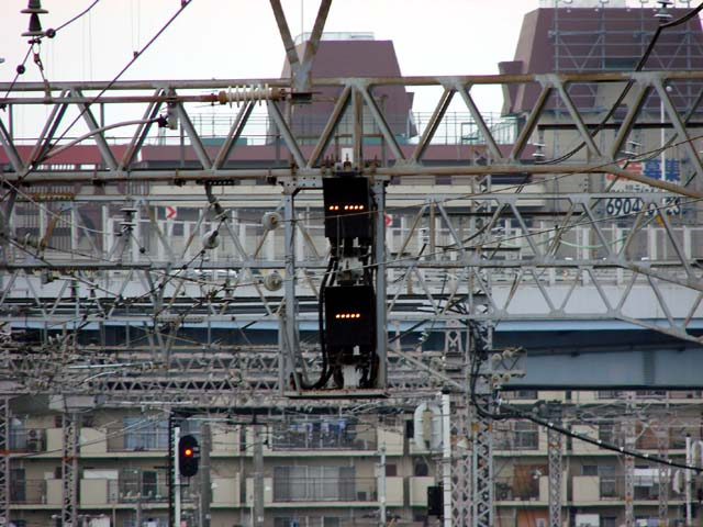 天王寺駅入換標識